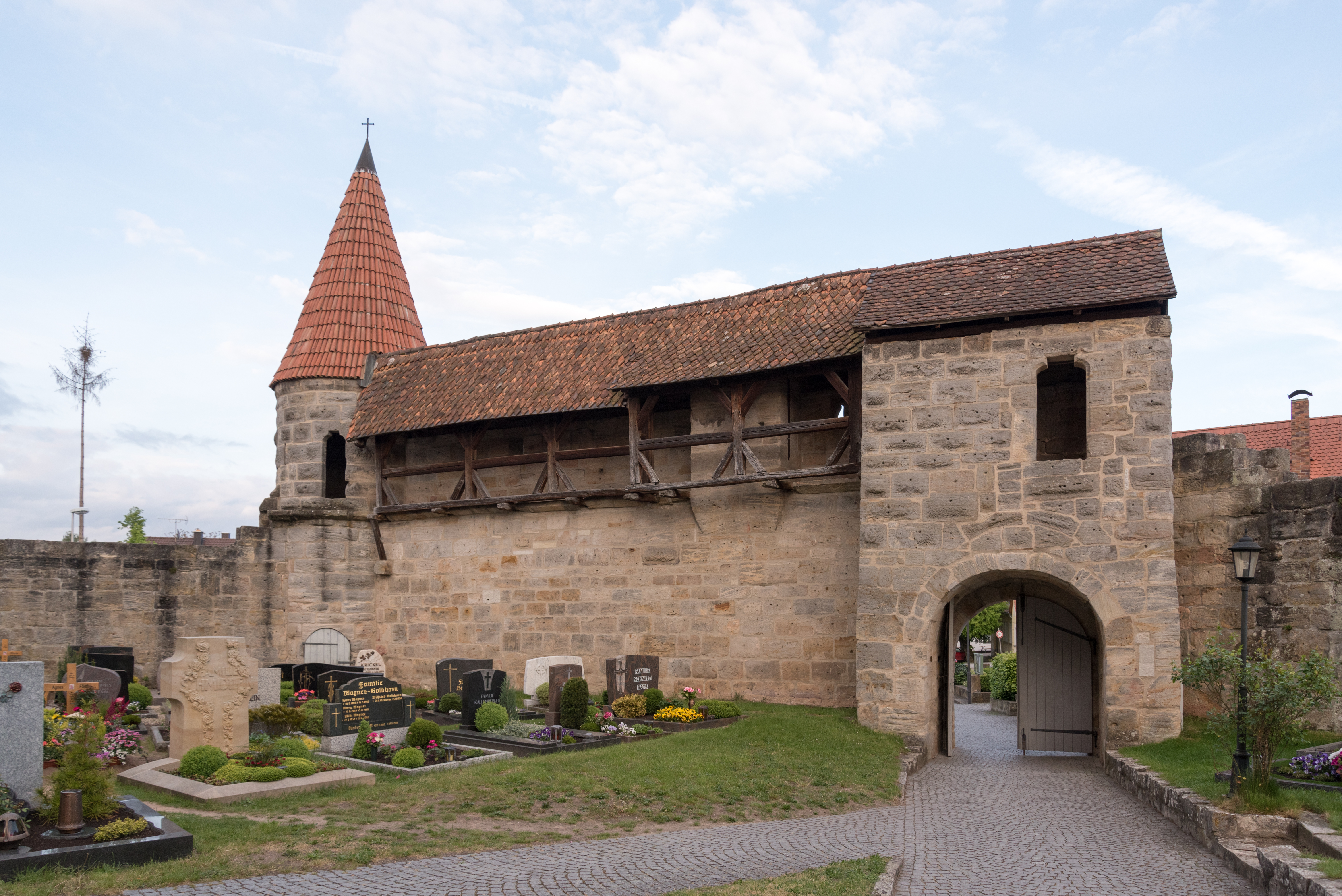 Effeltrich, Kirchenburg